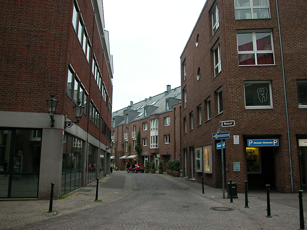 Akademiestraße, Düsseldorf-Altstadt